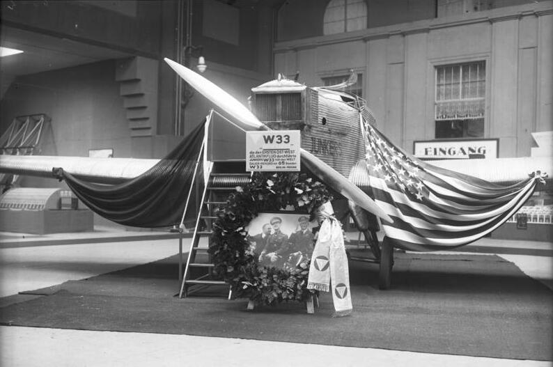 Die Eröffnung der II. Internationalen Luftfahrt-Ausstellung in den Ausstellungshallen am Kaiserdamm in Berlin 1. Das Junkers-Flugzeug "Bremen", mit welchem Hauptmann Köhl, von Hünefeld und Major Fitzmaurice den ersten Ost-West-Flug über den Ozean ausführten. Vor der Maschine das geschmückte Bild der drei erfolgreichen Ozeanflieger.